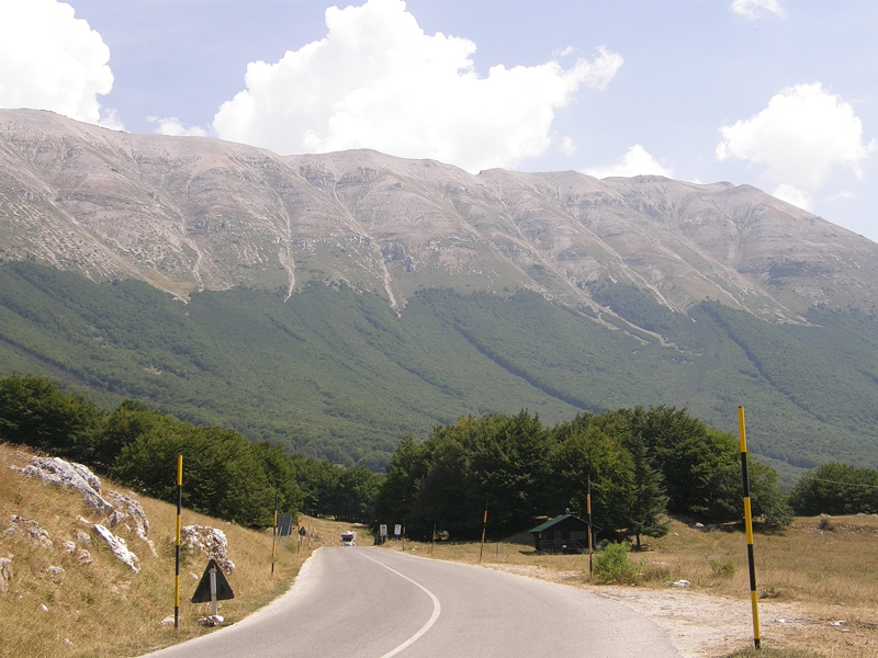 Vicino Passo San Leonardo (Caramanico Terme)